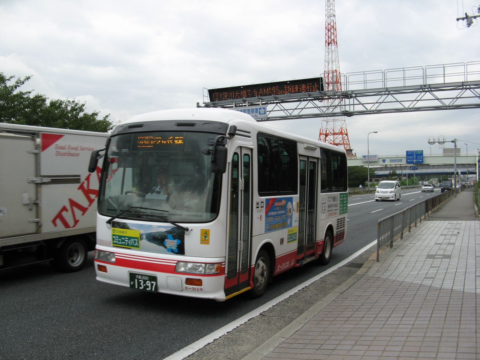 四條畷市コミュニティバス 西部循環ルート左回り 市民総合体育館バス停にて 2007年7月2日 Bakkai撮影